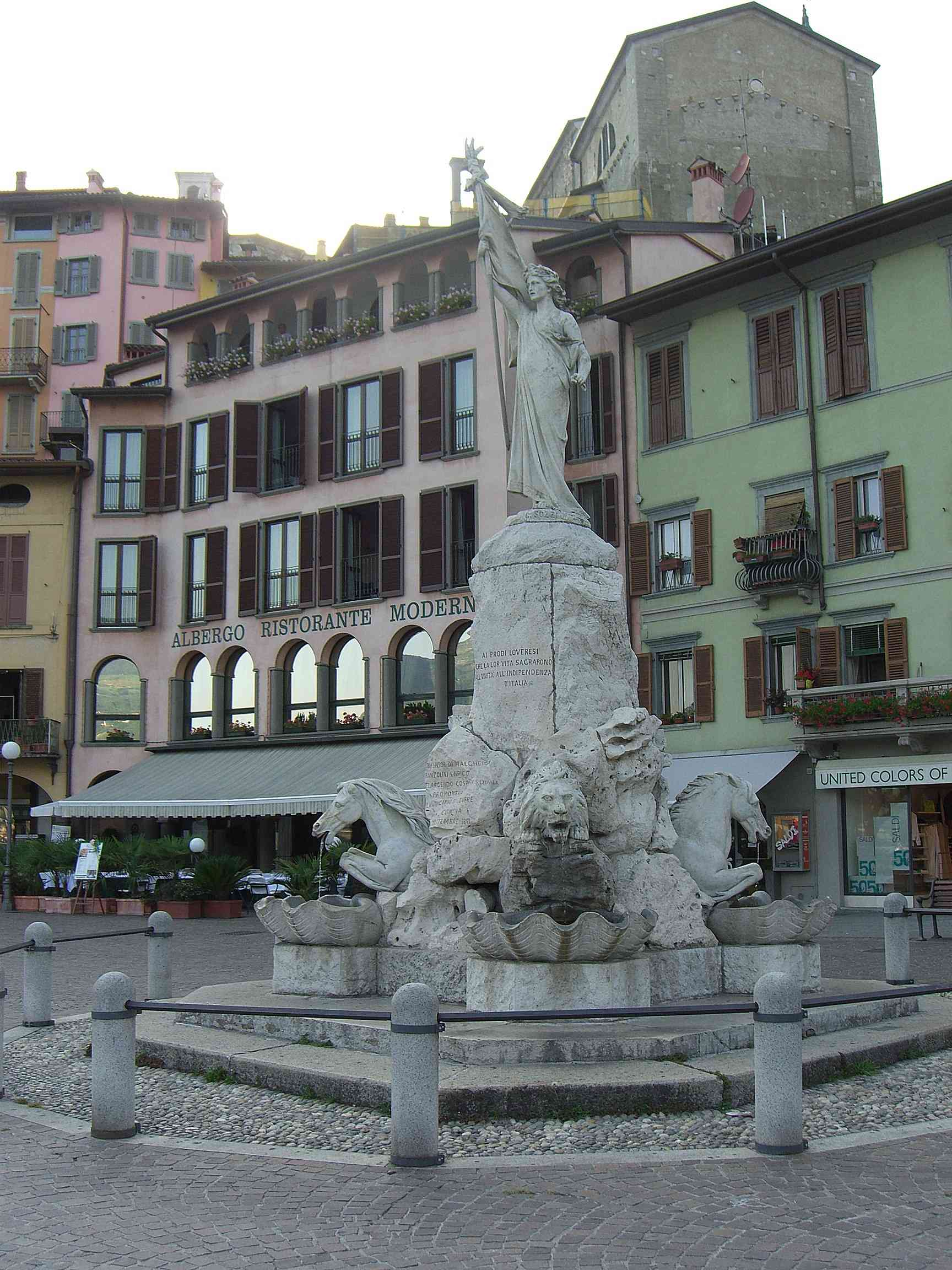 Lovere BG fontana dedicata "ai prodi loveresi che la lor vita sagrarono all'Unità all'Indipendenza d'Italia" sulla base della statua femminile simboleggiante la Liberta' si legge il nome dell'autore G. Sozzi [*] più sotto l'anno 1881 mese di Settembre [*] Giacomo Sozzi scultore milanese]